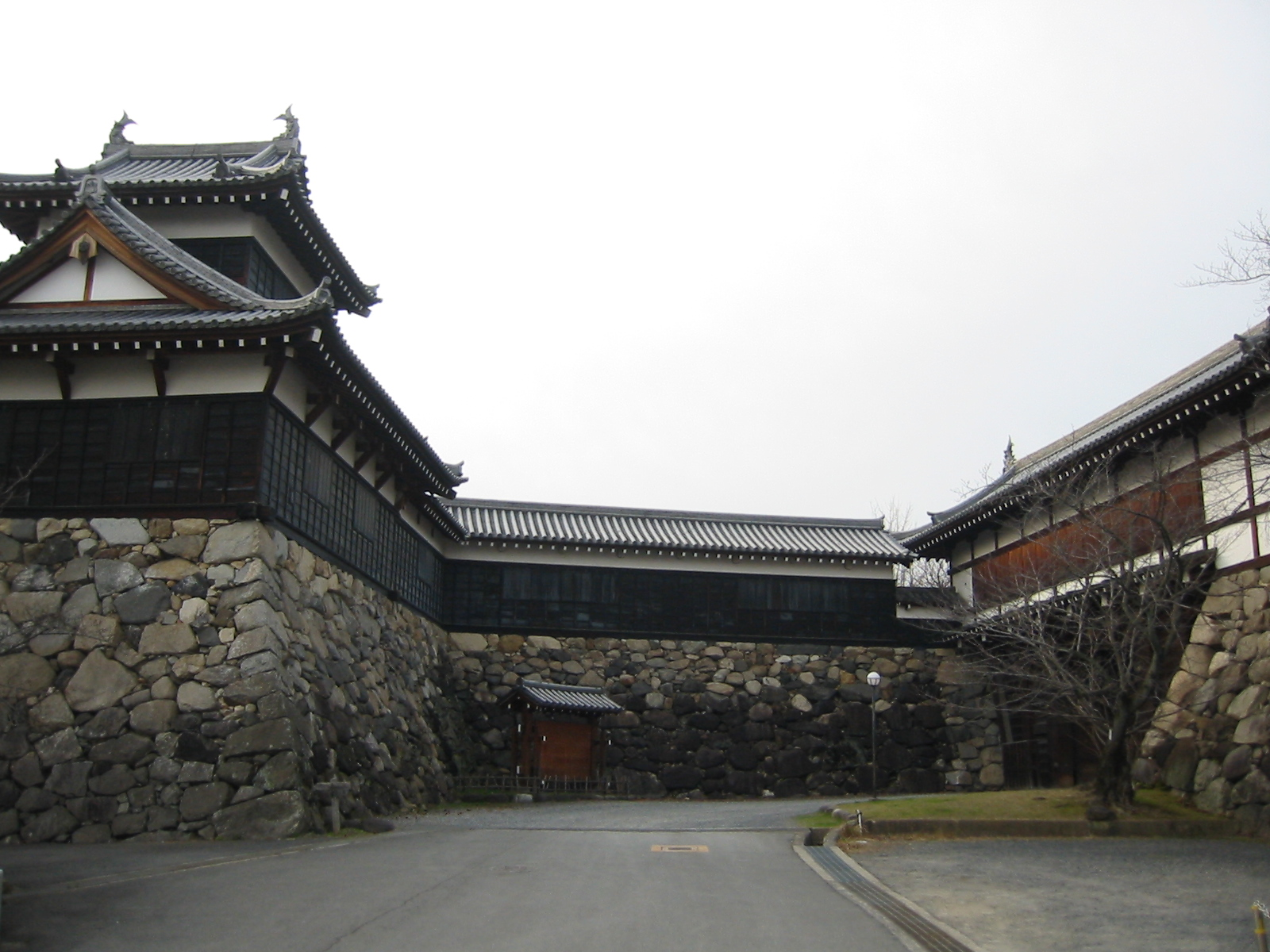 Kooriyama Castle